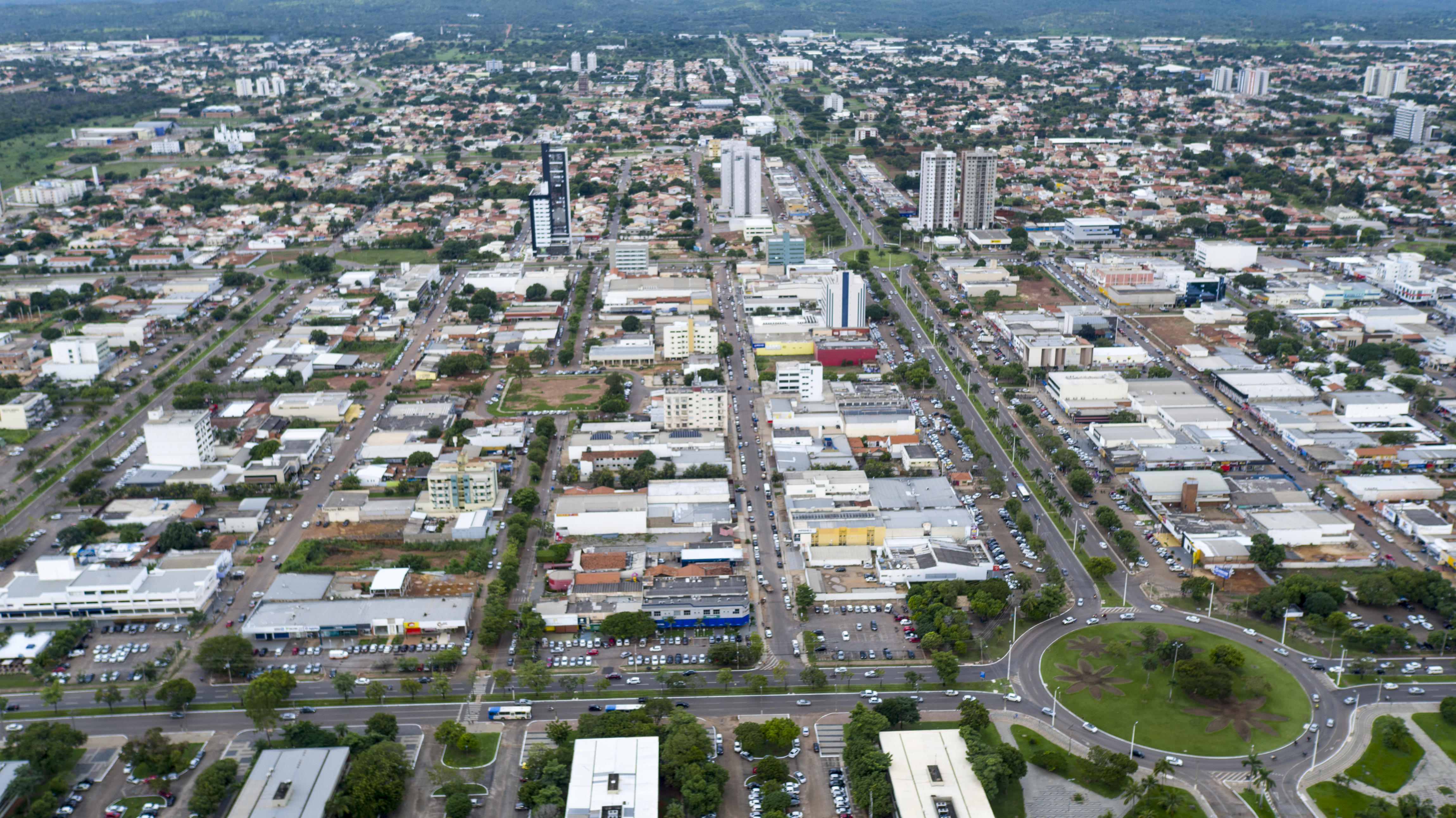 Crédito obrigatório: Flávio André - MTUR